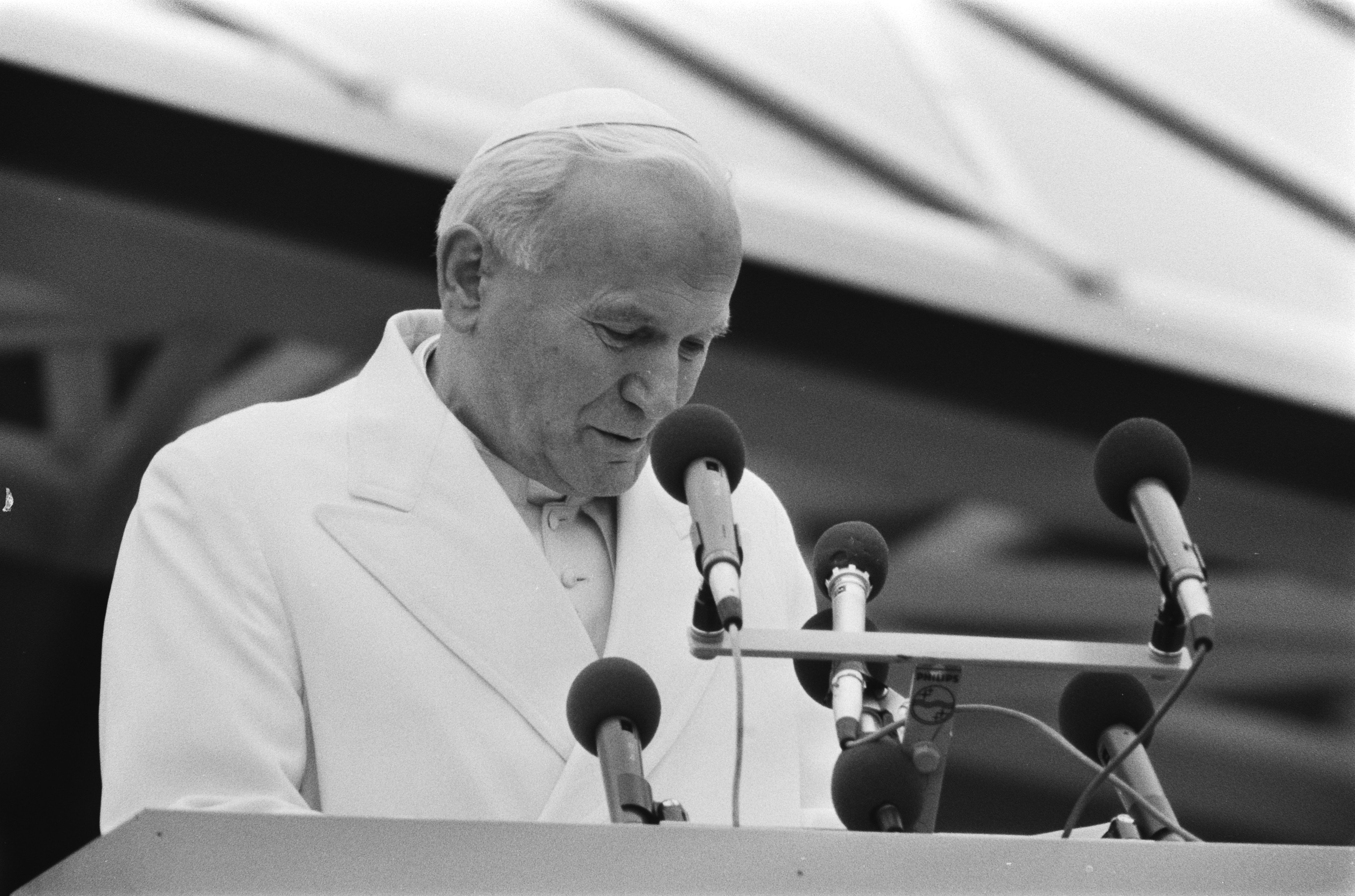 Collectie / Archief : Fotocollectie Anefo Reportage / Serie : [ onbekend ] Beschrijving : Bezoek Paus Johannes Paulus II aan Nederland; de Paus tijdens zijn toespraak op Welschap (close) Datum : 11 mei 1985 Trefwoorden : bezoeken, pausen, toespraken Persoonsnaam : Johannes Paulus II (paus) Fotograaf : Croes, Rob C. / Anefo Auteursrechthebbende : Nationaal Archief Materiaalsoort : Negatief (zwart/wit) Nummer archiefinventaris : bekijk toegang 2.24.01.05 Bestanddeelnummer : 933-3254